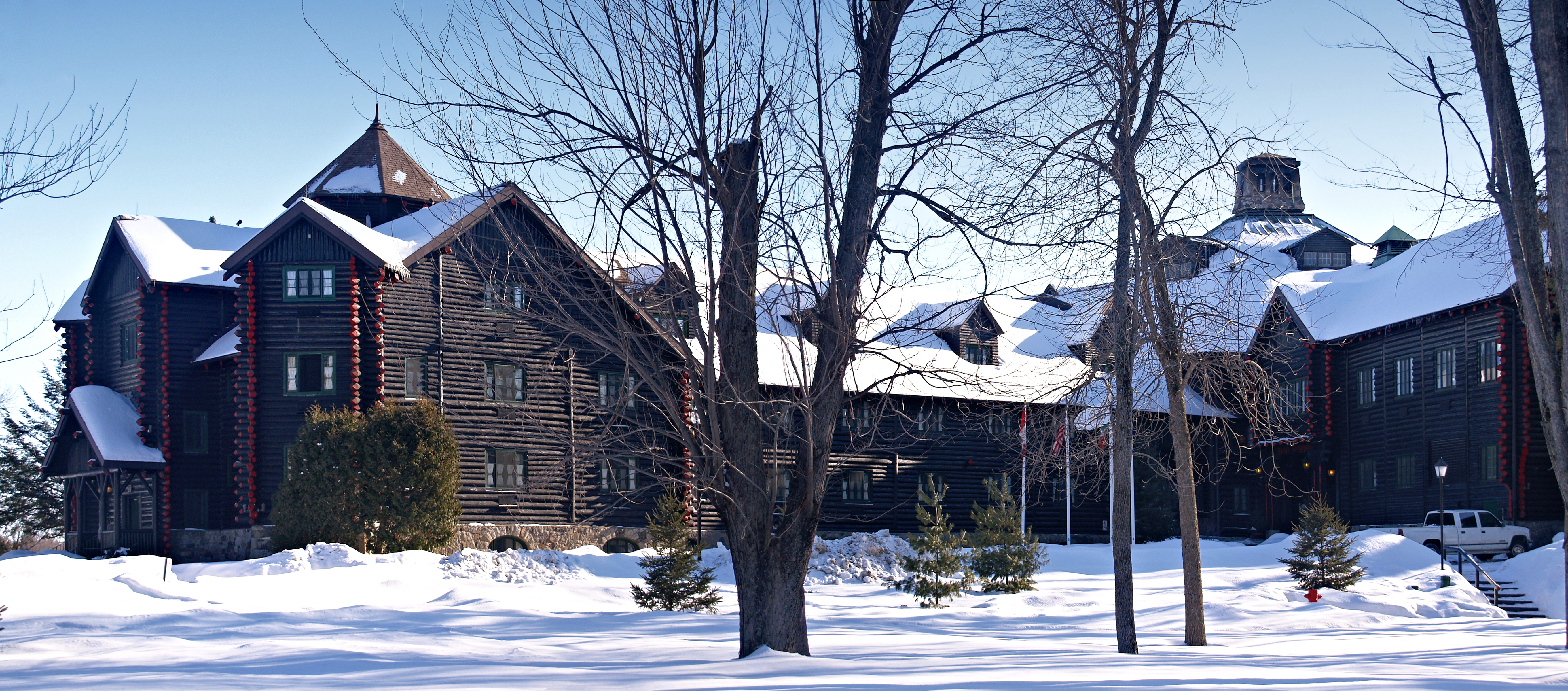 Montebello (Québec) - Fairmont Le château Montebello